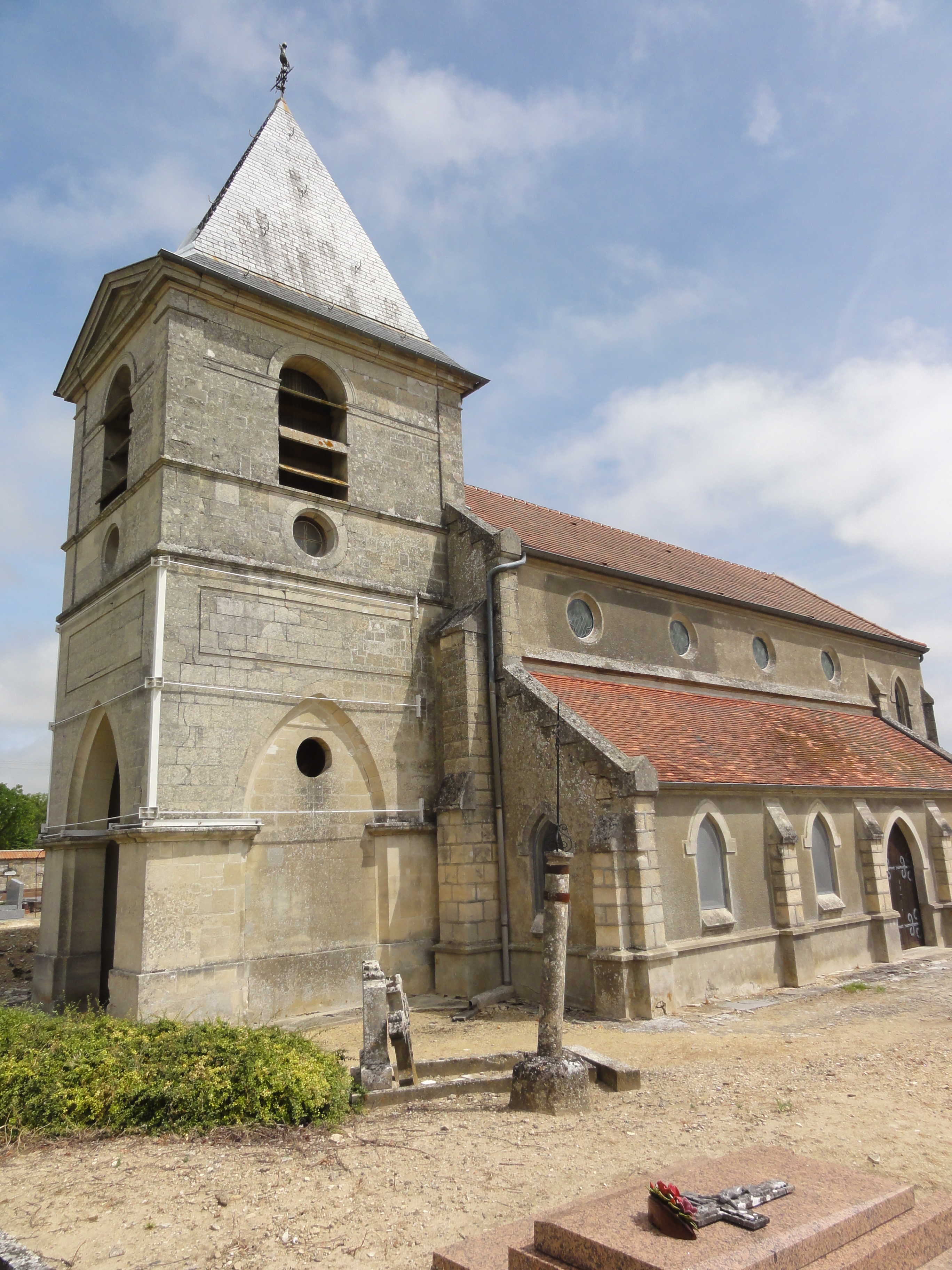 Pargnan (Aisne) église